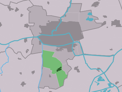 Kaartsje fan himrik fan Wurdum